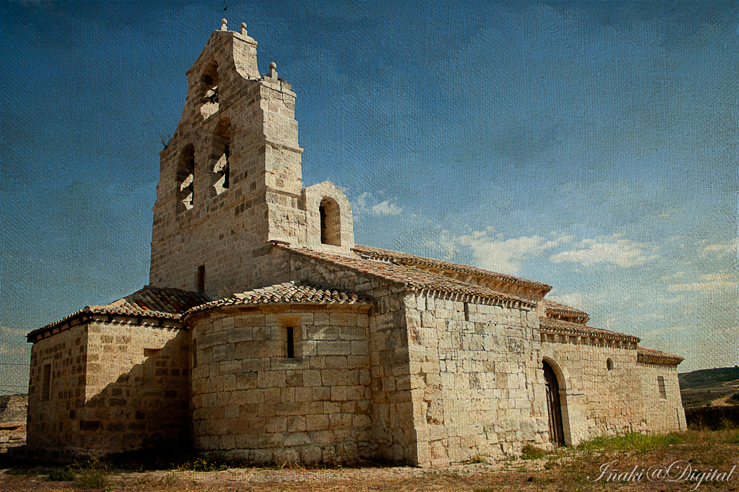 Iglesia San Juan Bautista 2012